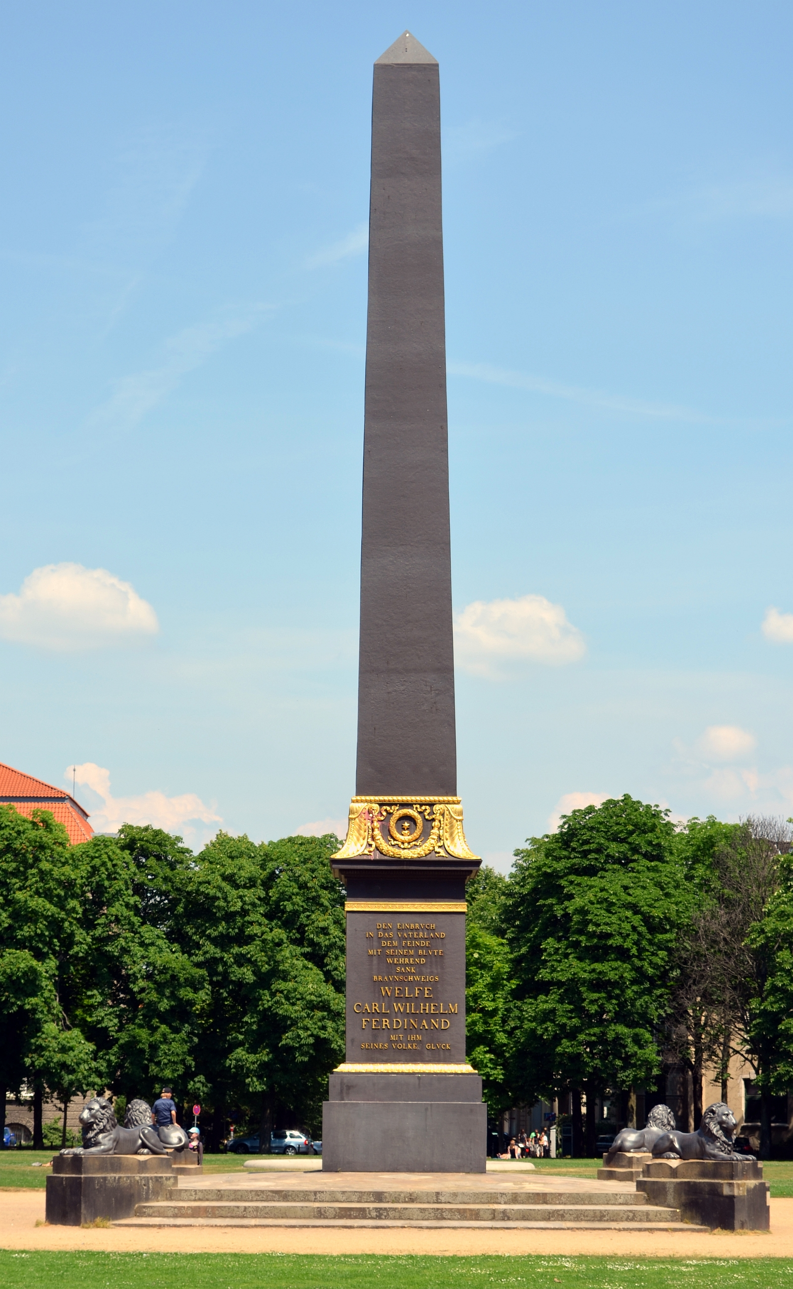 Braunschweig: Obelisk auf dem Löwenwall, von Südwesten gesehen.